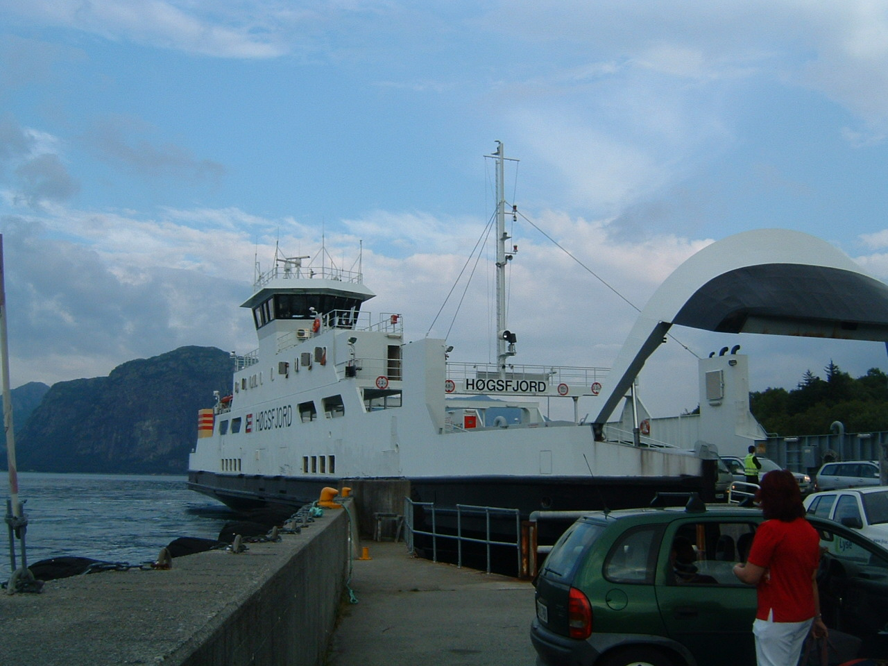 M/F Høgsfjord ved kaien på Lauvik